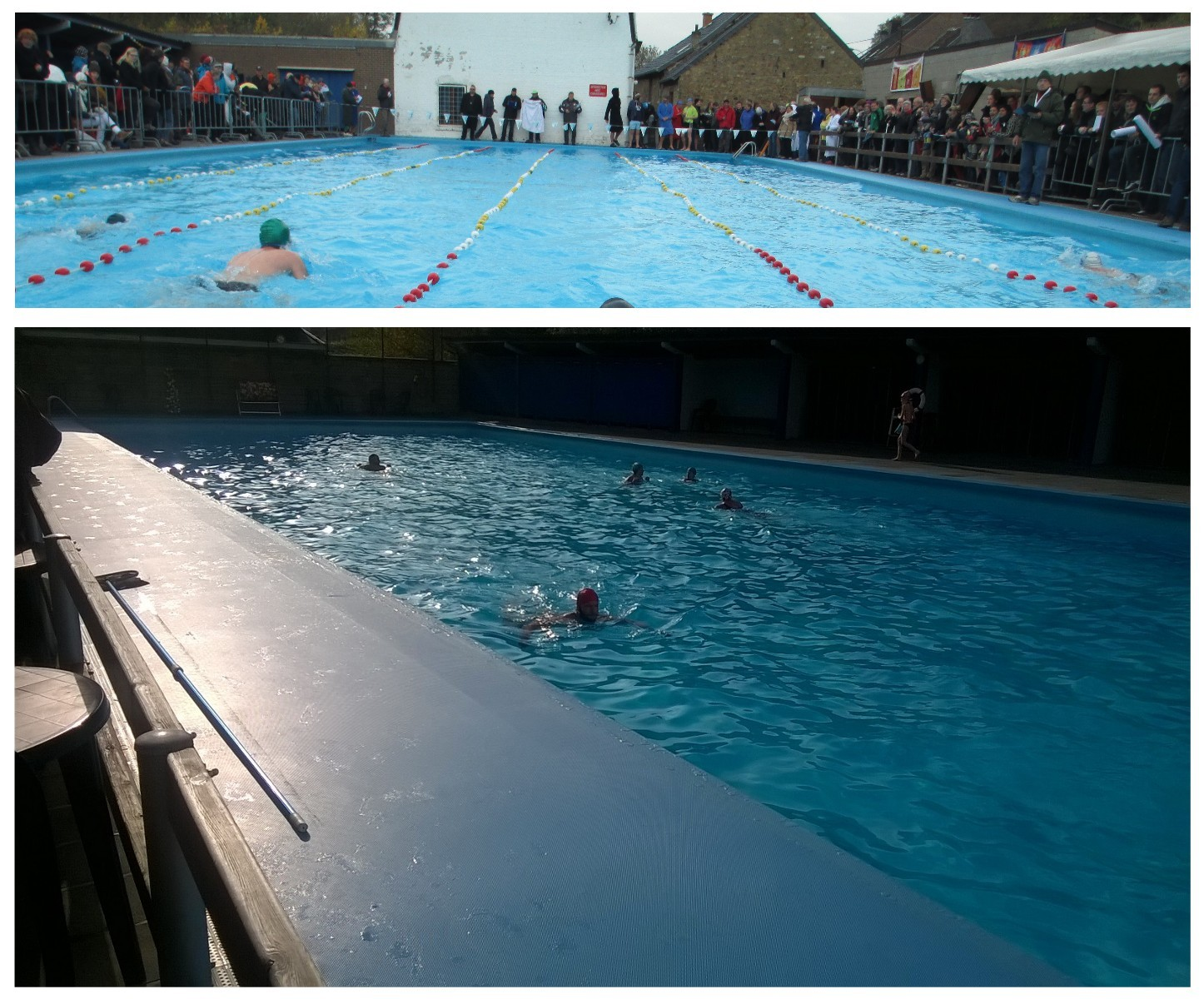 Chaque année au mois de novembre, parfois après avoir cassé la glace, le Royal Club Theux Natation organise sa "fête hivernale" (ici, le 17.11.2013), une compétition par catégories d'âge à laquelle participent des nageuses et nageurs originaires de Huy (second club de Wallonie), et les clubs flamands de Bruges (Brugge), Termonde (Dendermonde), Boom, Wachtebeke et Deurne. De septembre à mars, par tous les temps, la centaine de membres du club RCTN s'entraîne librement le mercredi soir à 19 h et le dimanche à 11 h. : ils effectuent chacun entre 4 et ... 20 longueurs de 33 mètres.